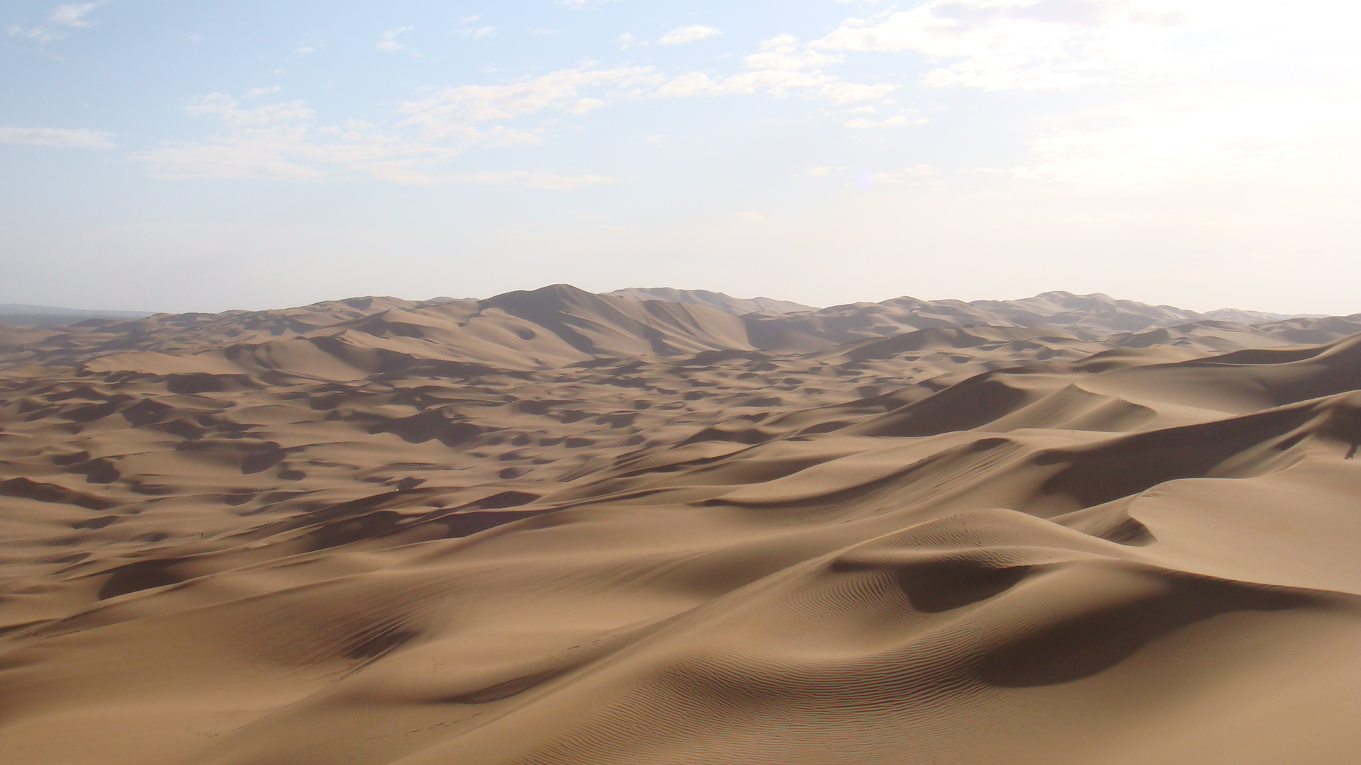 中国新疆鄯善县库木塔格沙漠 China Xinjiang, Piqan County Desert China Xinjiang Urumqi Welcome you to tour the, Китай Синьцзяна Урумчи приветствовать Вас на экскурсию, الصين ترحب زيارتك لاورومتشى فى شينجيانغ, 中国新疆のウルムチへの訪問を歓迎する, 中国新疆乌鲁木齐欢迎您来观光旅游，